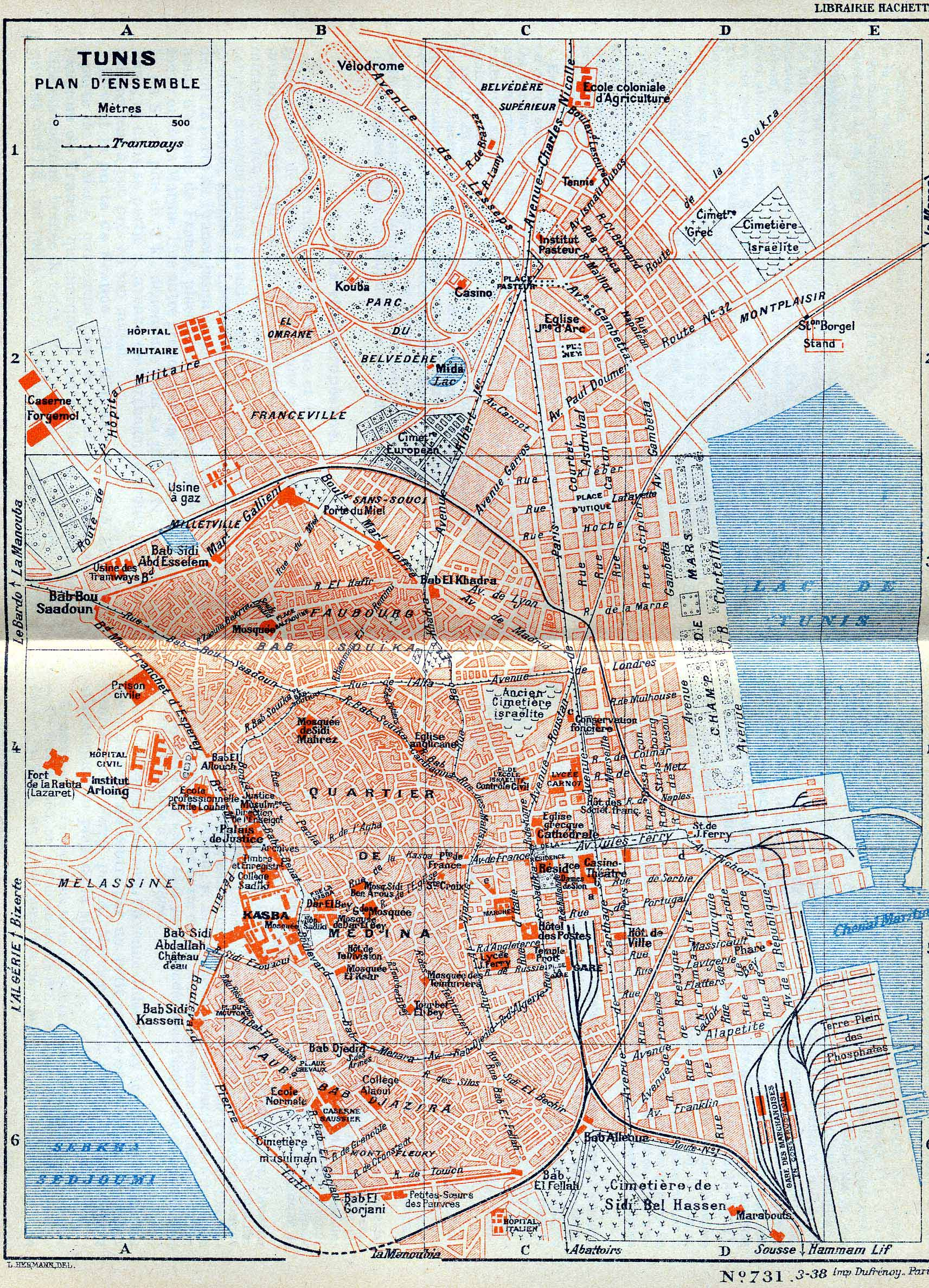 Plan de Tunis en 1937, Tunisie